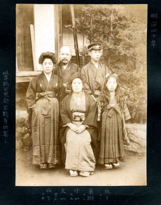 明治40年 岐阜県可児郡宝積寺？？ 宮地秋子、景樹、けい、文一、ふで